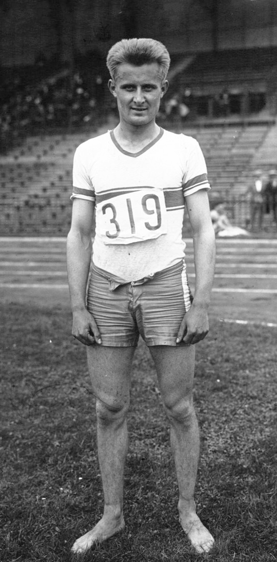 Colombes : championnats de France d'Athlétisme : Adelheim (portrait) gagnant du 400 m. haies : [photographie de presse] / Agence Meurisse